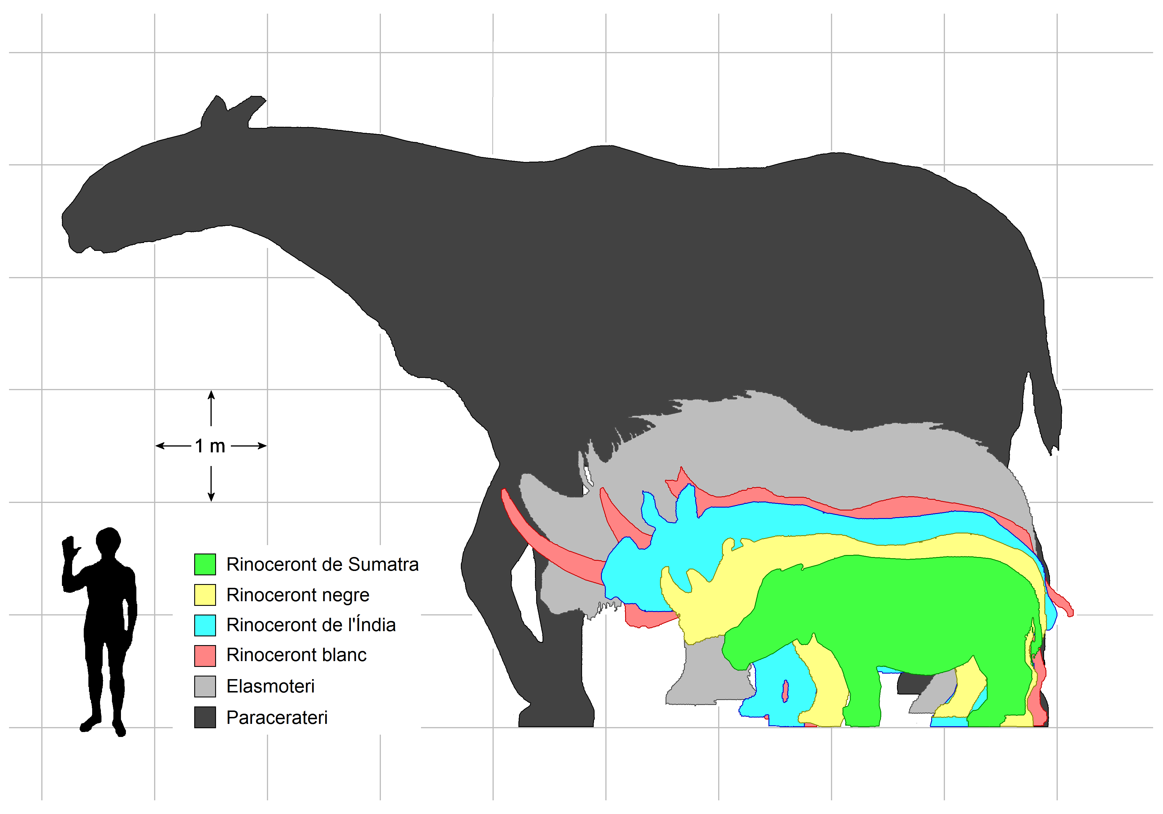 Mida d'un humà i diversos rinocerotoïdeus, tant actuals com extints. Traduït de File:Rhino sizes English.png.